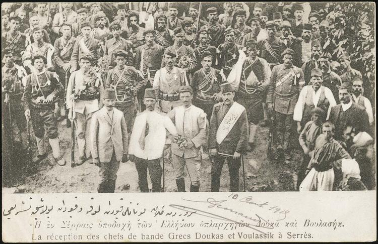 Посрещане на четата на капитан Дукас Дукас в Сяр.